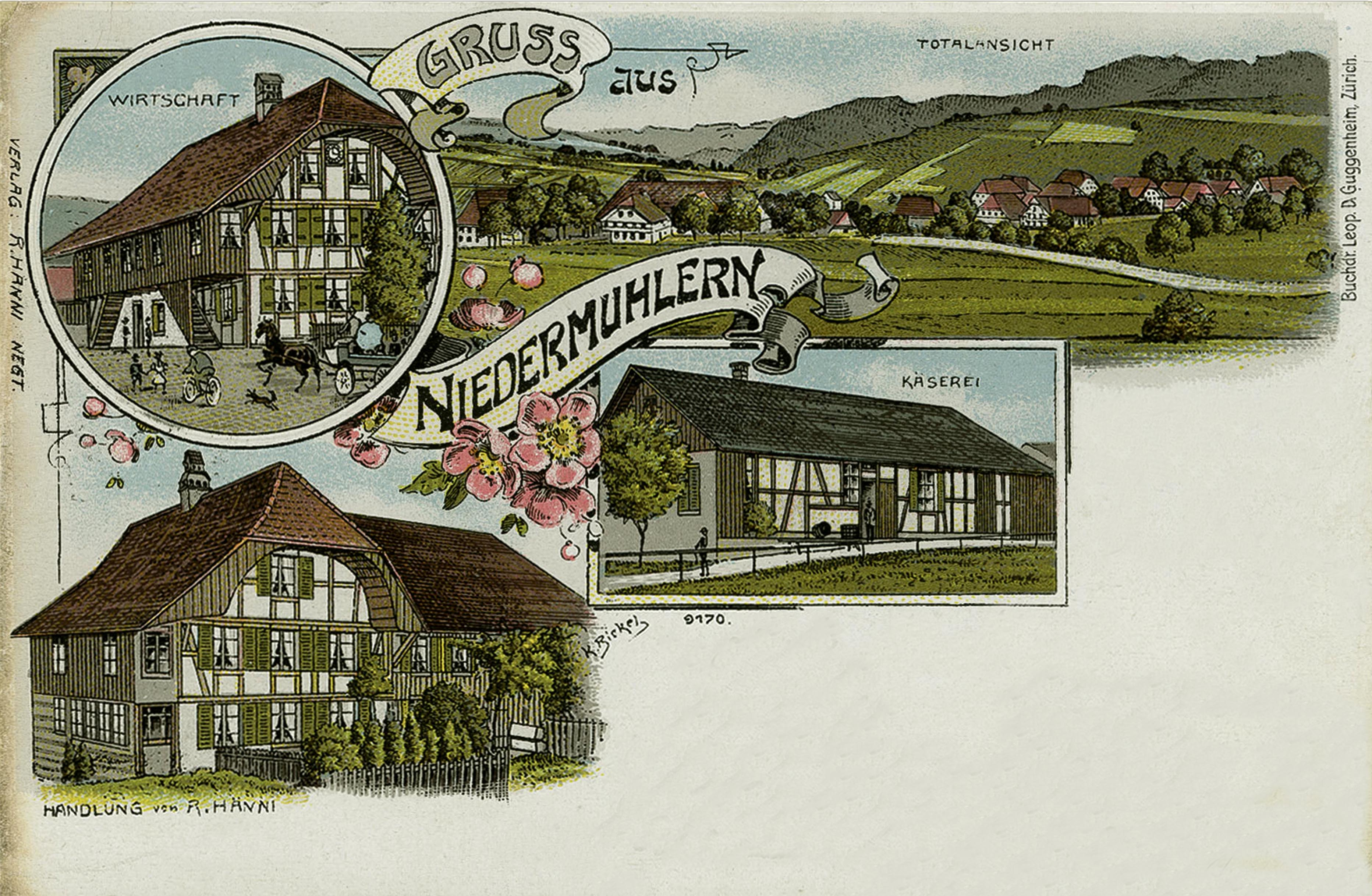 Gruss aus Niedermuhlern, lithografische Postkarte von 1900